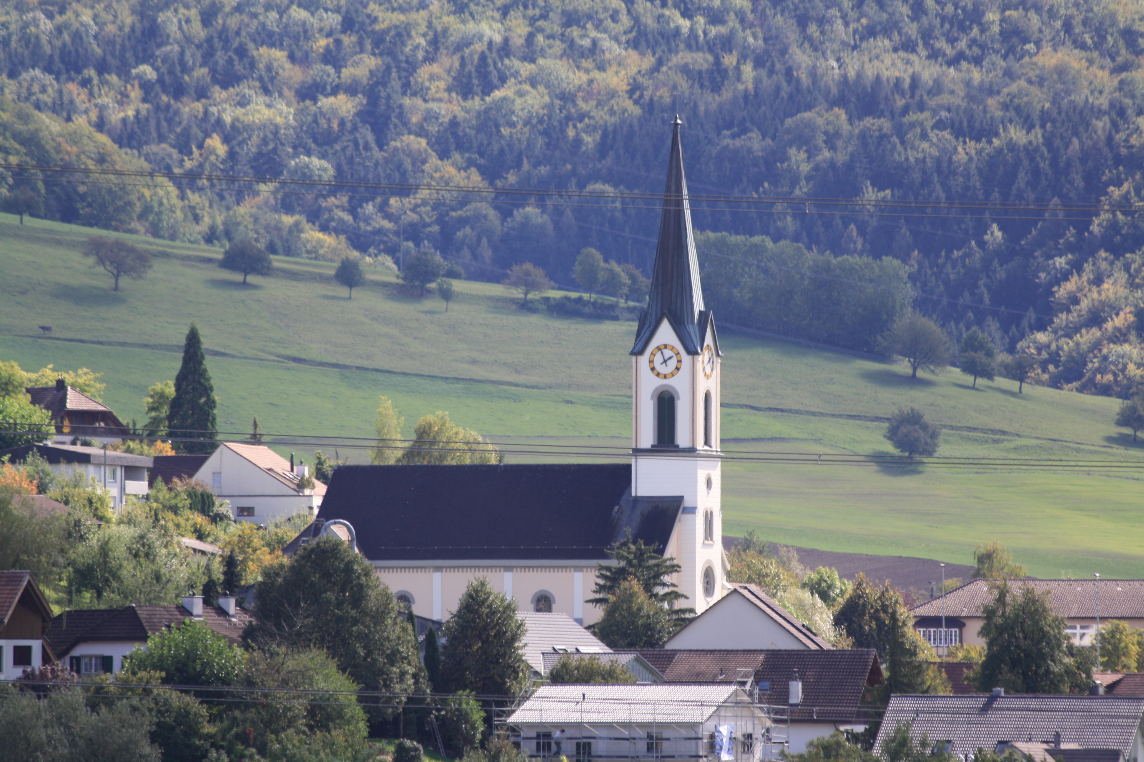 Gansingen